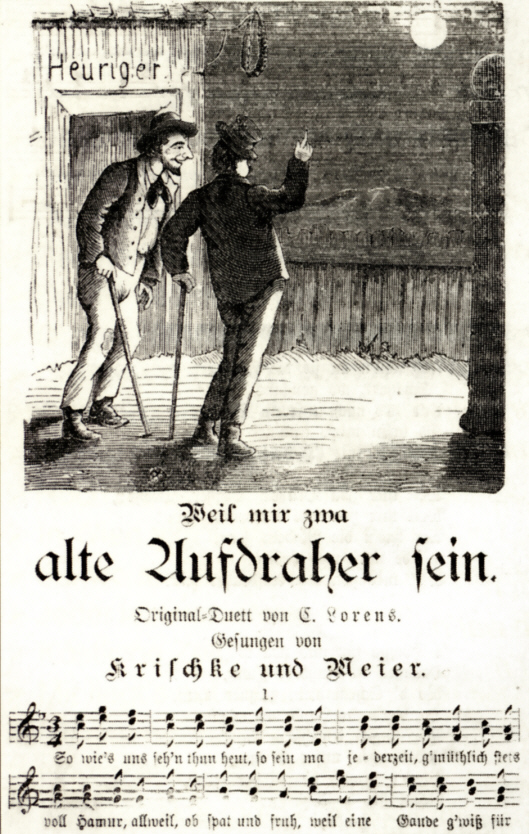 Weil mir zwa alte Aufdraher sein von Carl Lorens (Bezirksmuseum Meidling)